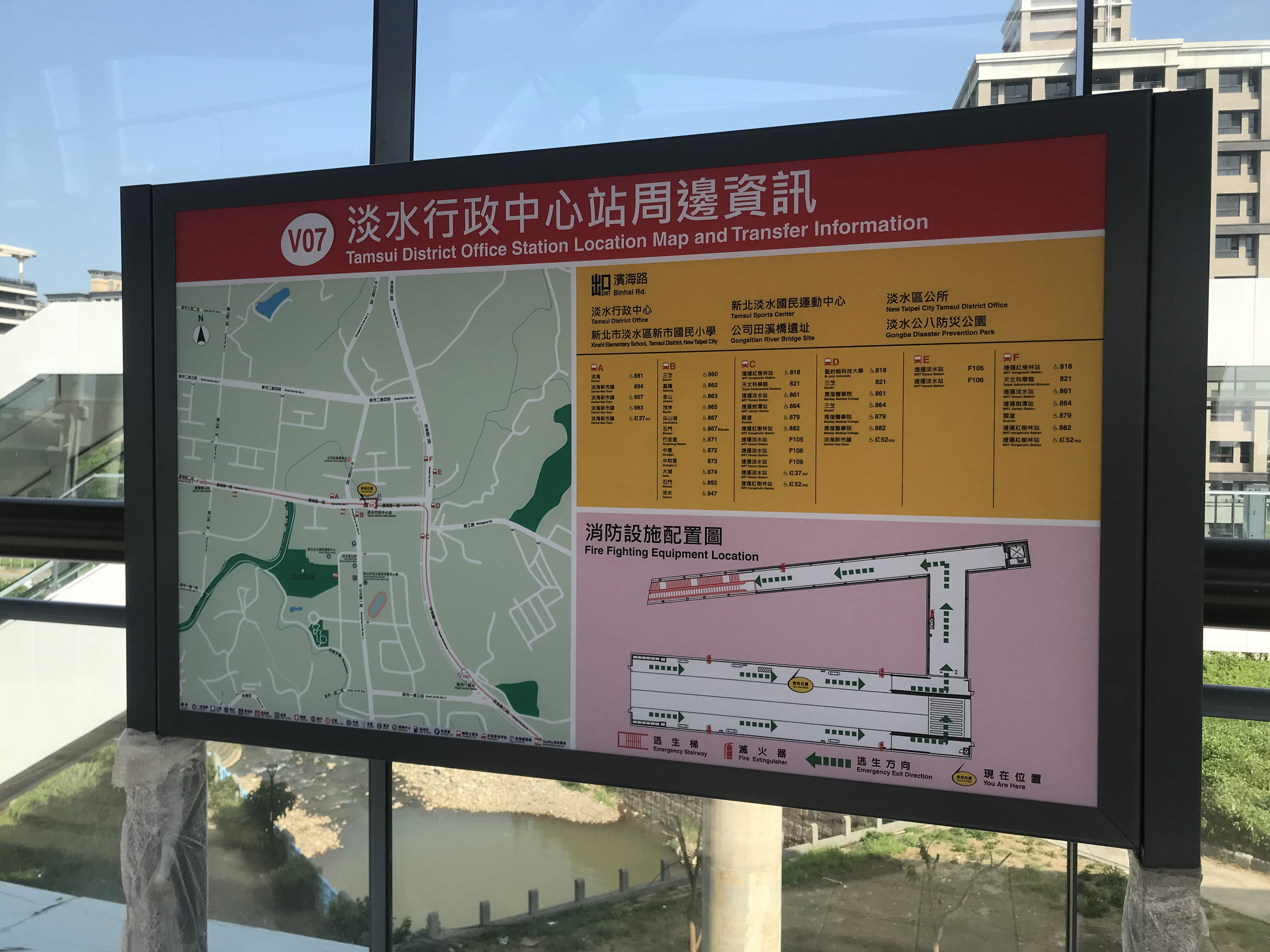 中文（台灣）: 淡海輕軌淡水行政中心站周邊資訊牌